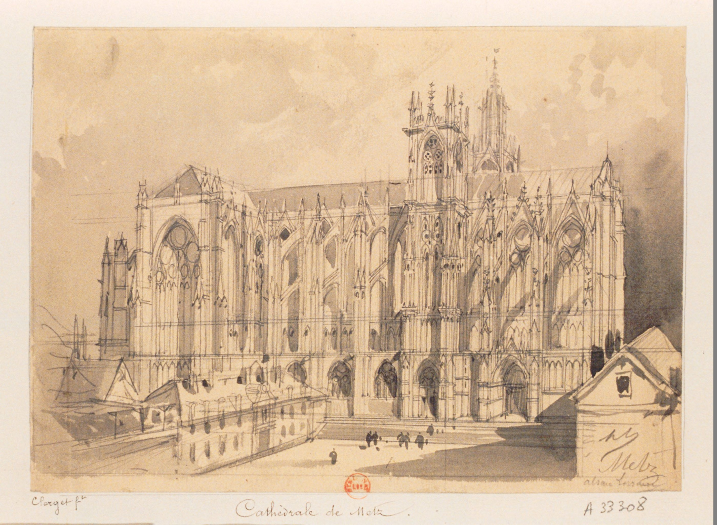 Cathédrale de Metz Lorraine : dessin